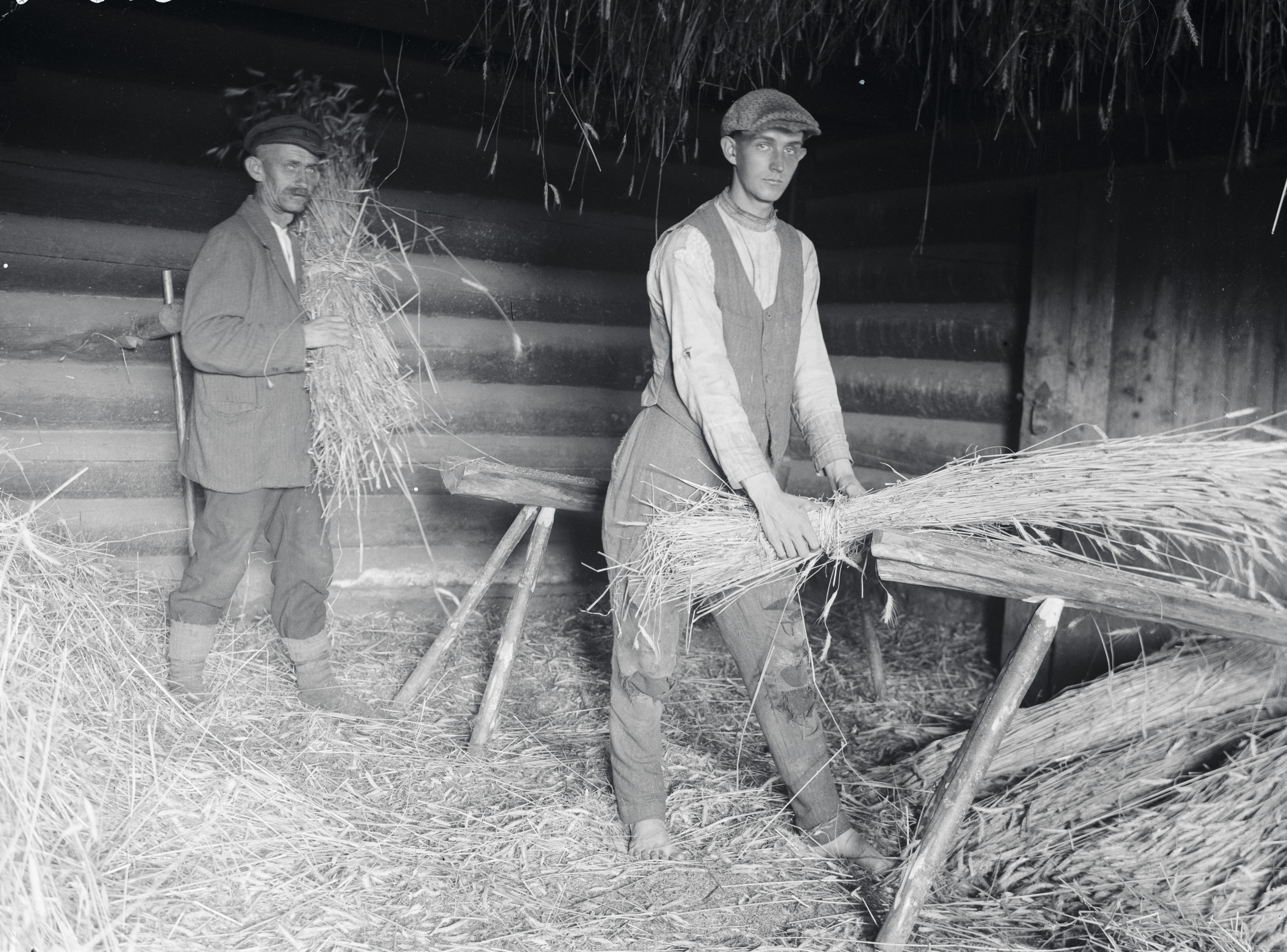 Rukkirehe rabamine rehetoas